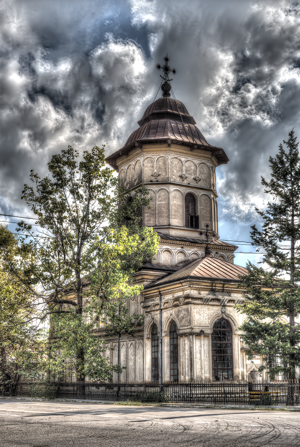 Biserica „Sf. Dumitru și Sf. Nestor” din satul sat Mânăstirea, comuna Mânăstirea, localizata la 40 km de municipiul Calarasi, pe DN31